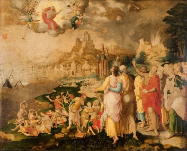 Chrystus zapowiada Sąd Ostateczny, epitafium Hansa Mohrenberga; 1567, 142 x 176 cm, Muzeum Narodowe we Wrocławiu